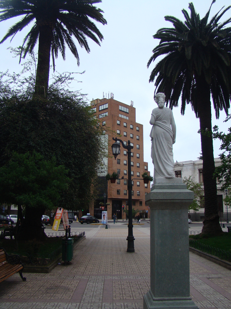 Vista de la plaza de armas de Talca hacia la esquina Nor-oriente